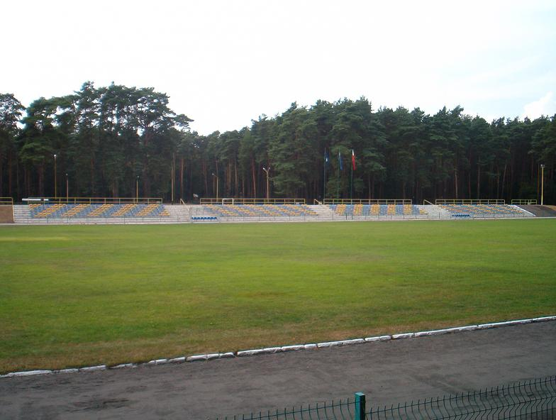 Trybuna Stadionu Miejskiego w Goleniowie